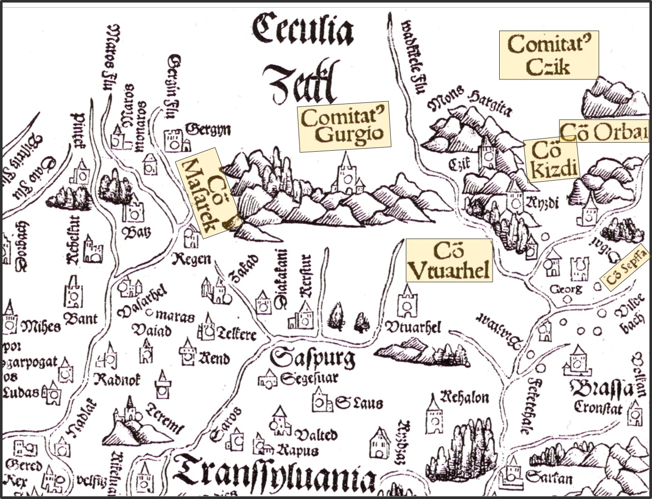 Szekelyland - Szeklerland - Székelyföld - Secuimea. Detail from